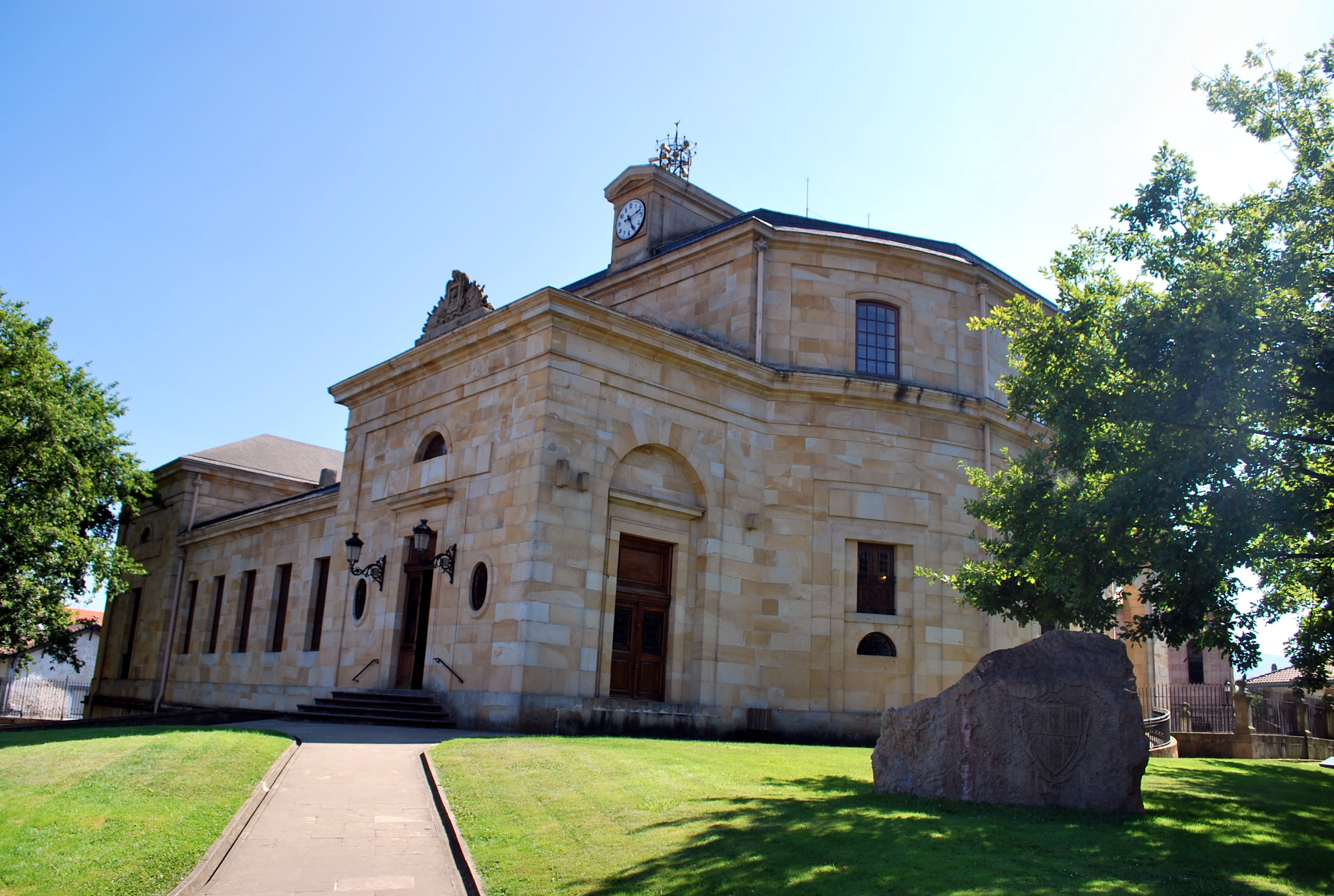 Façade principale du Parlement Foral de Biscaye (Batzarre Nagusia) à Gernika (Biscaye).